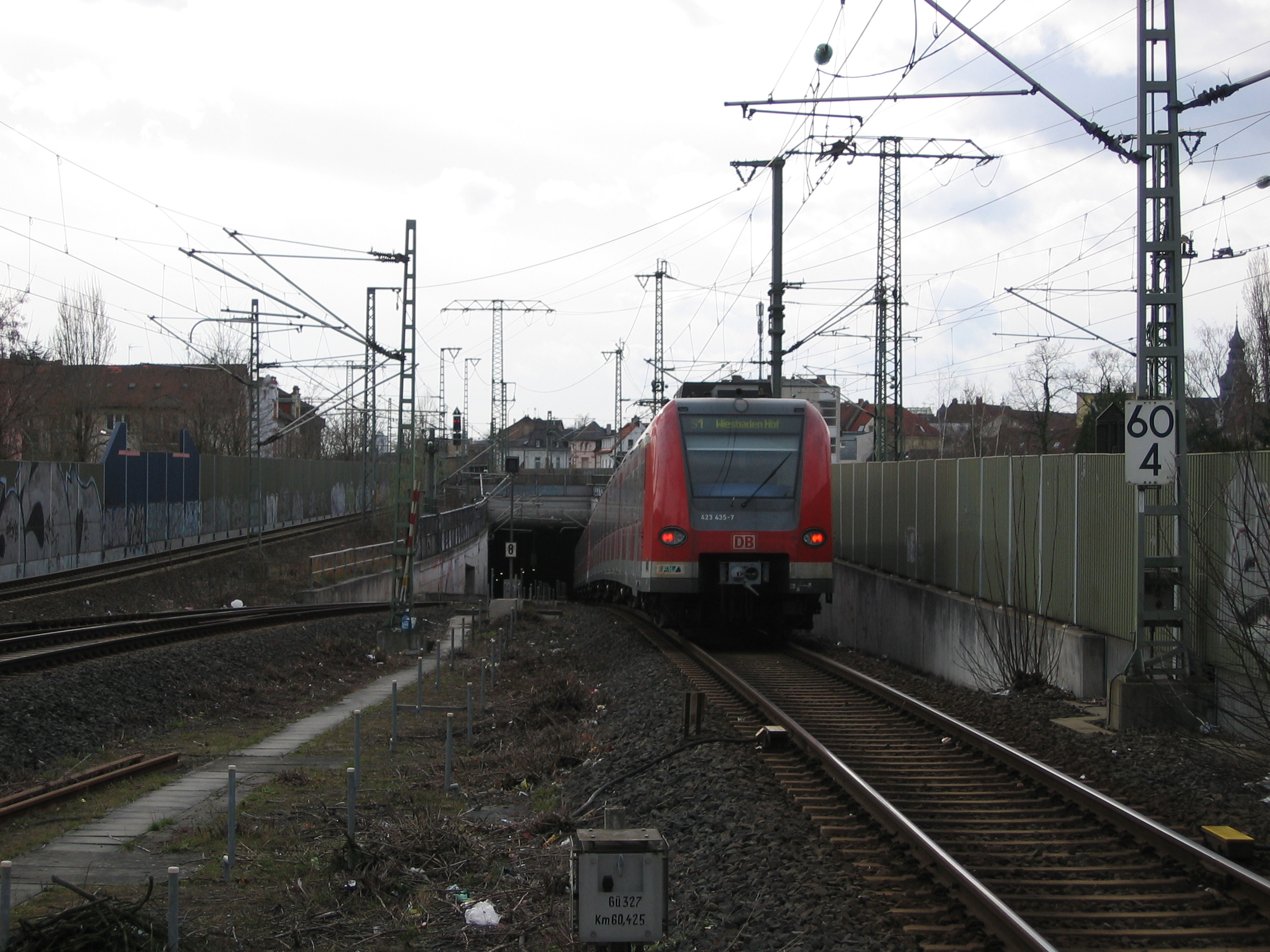 Train type 423 in Offenbach am Main-Ost, Germany entering the City-Tunnel Offenbach/ Baureihe 423 in Offenbach am Main-Ost fährt in den City-Tunnel Offenbach ein